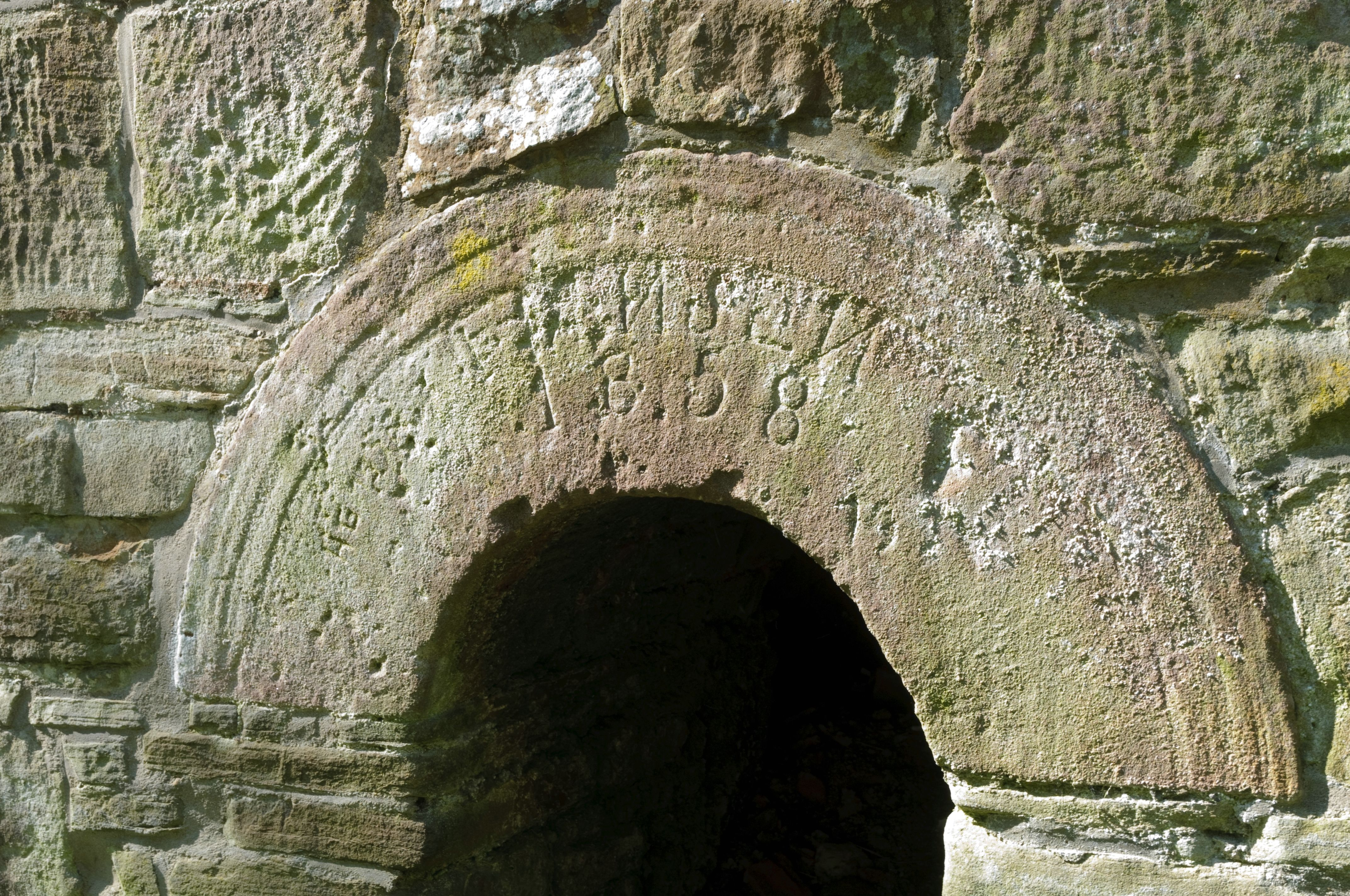 Oberer Jansenkotten Schornstein Jahreszahl